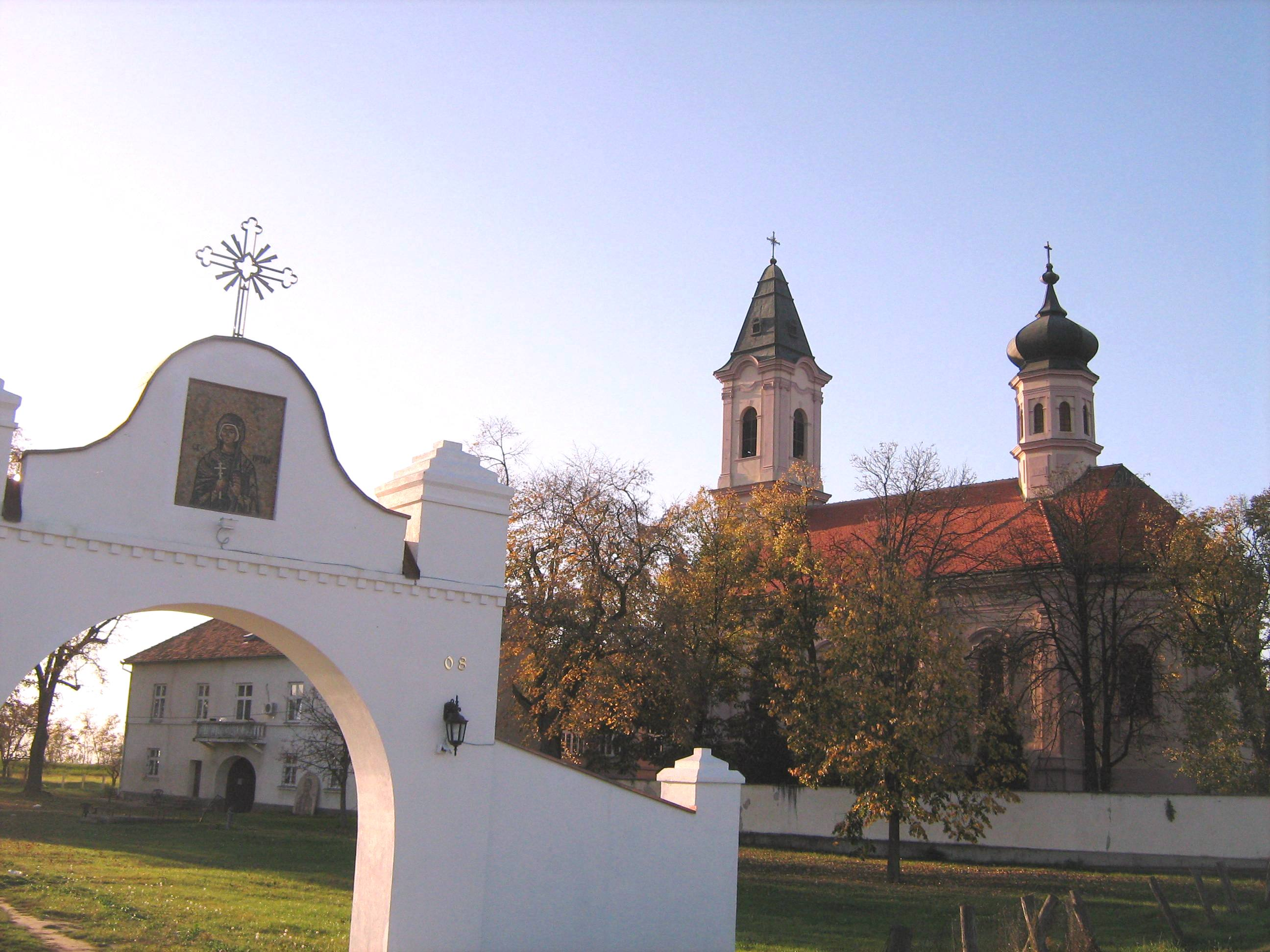 Манастир Фенек, Новембар 2008. године